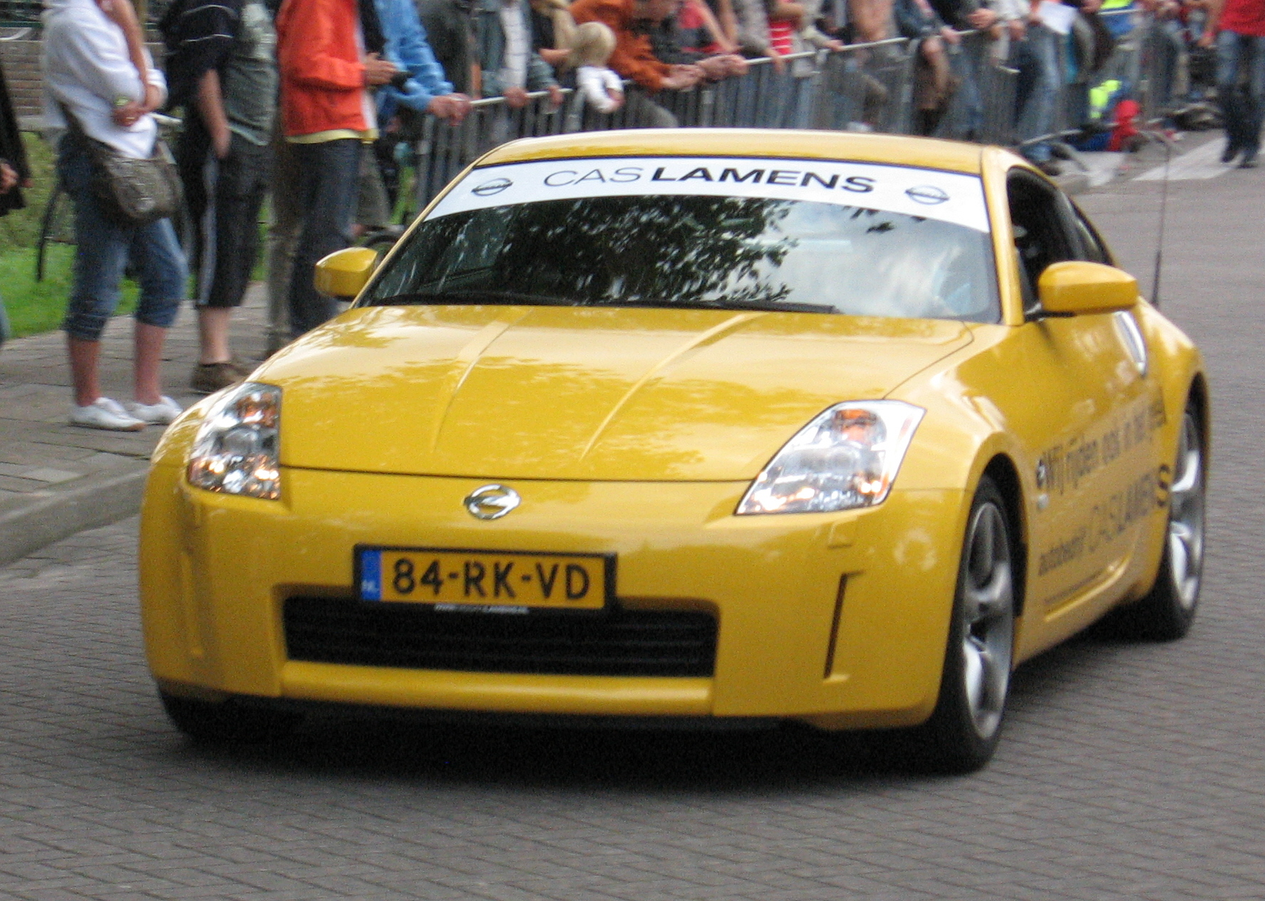 NISSAN 350Z, Pijnacker